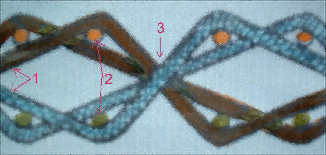 Schema: Struktur einer Trikotbindung Česky: Schema: Prurez osnovou tkaniny v trikotove vazbe